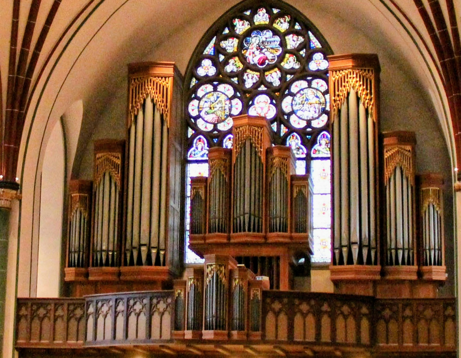 Führer-Orgel in der St. Viktor-Kirche in Damme (Dümmer), erbaut 1975